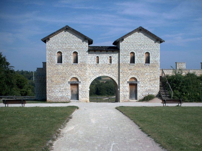 Rekonstruiertes Tor des Kastells Weißenburg (Kastell Biriciana) in Weißenburg in Bayern, Deutschland.